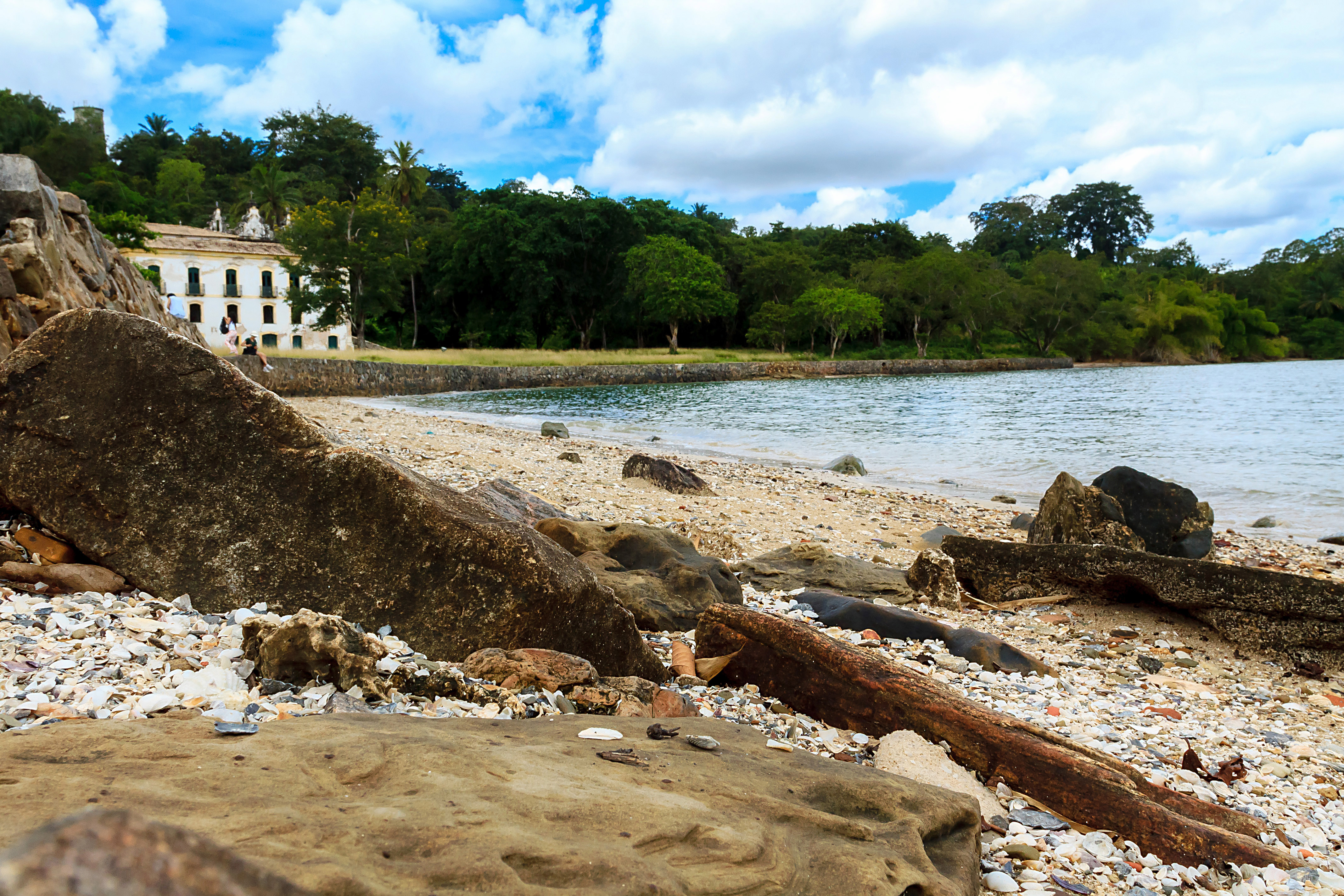 Caboto, Bahia, Brasil.